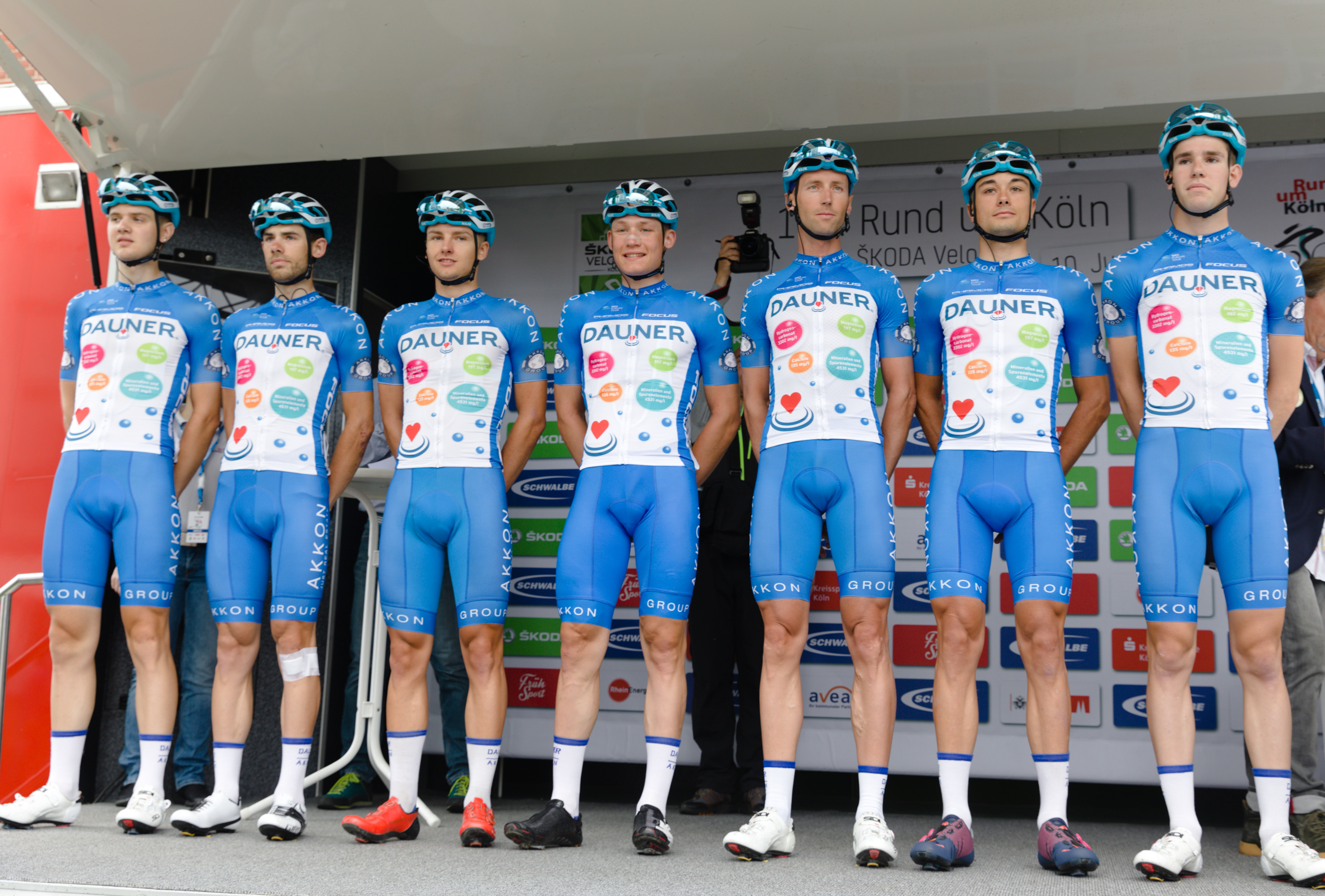 Das Team Dauner D&DQ Akkon bei Rund um Köln 2018, v.l.n.r.: Julian Braun, Fred Dombrowski, Christopher Heider, Simon Laib, Philipp Mamos, John Mandrysch, Sven Thurau